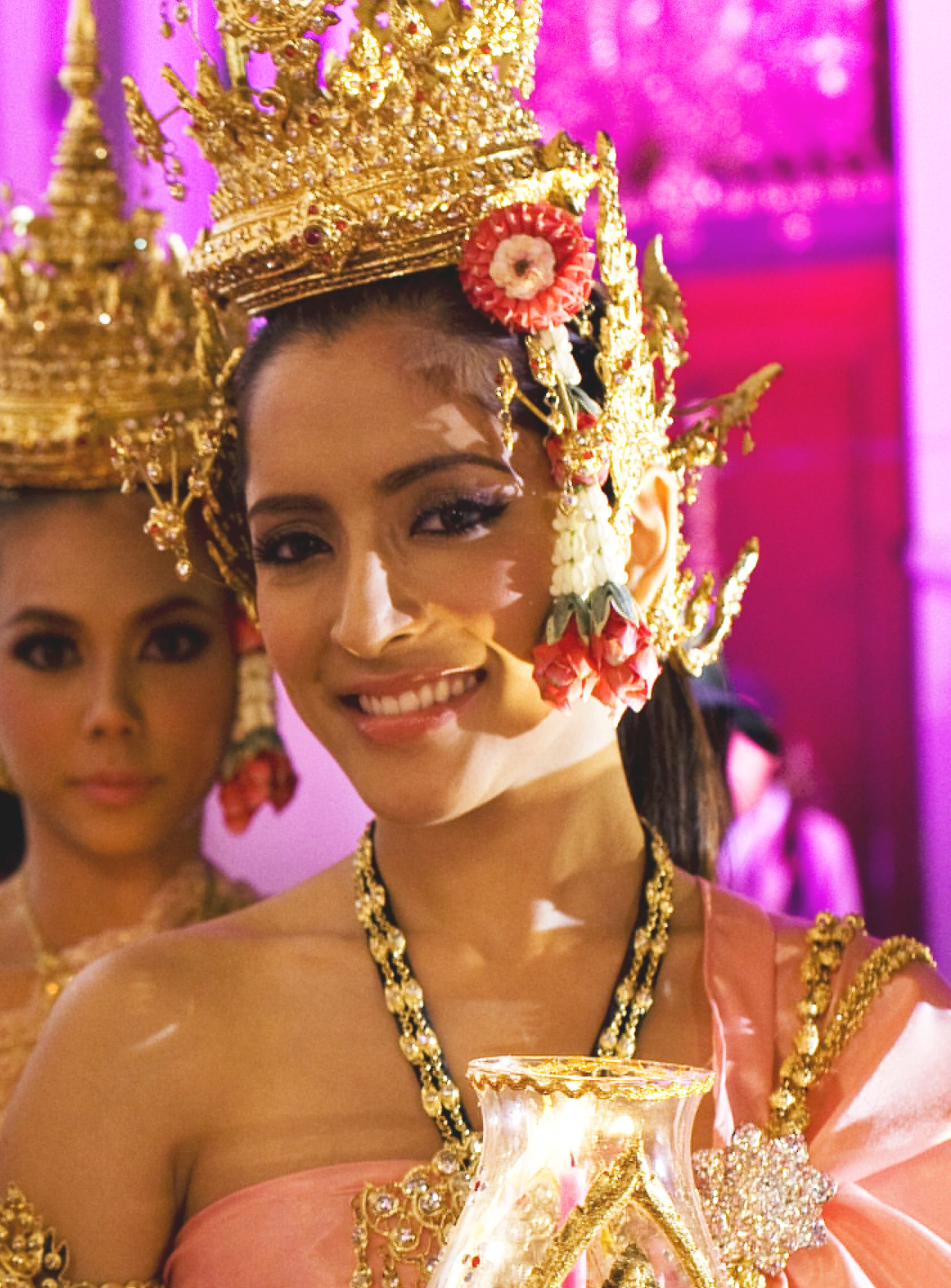 สาวิกา ไชยเดช / นายอภิสิทธิ์ เวชชาชีวะ นายกรัฐมนตรี เป็นประธานในพิธีปิดงานเฉลิมพระเกียรติพระบาทสมเด็จพระเจ้าอยู่หัว เนื่องในโอกาสมหามงคลเฉลิมพระชนมพรรษา 82 พรรษา 5 ธันวาคม 2552 ณ อนุสาวรีย์ประชาธิปไตย ถนนราชดำเนิน 13ธันวาคม2552 (The Official Site of The Prime Minister of Thailand Photo by พีรพัฒน์ วิมลรังครัตน์)